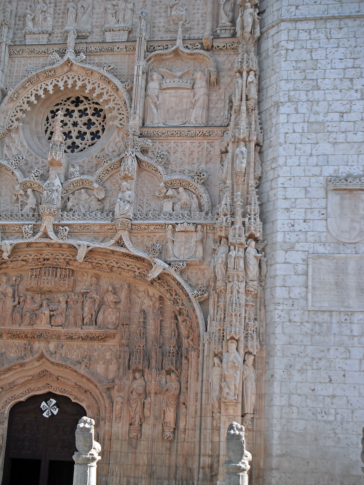 Iglesia conventual de San Pablo (Valladolid)